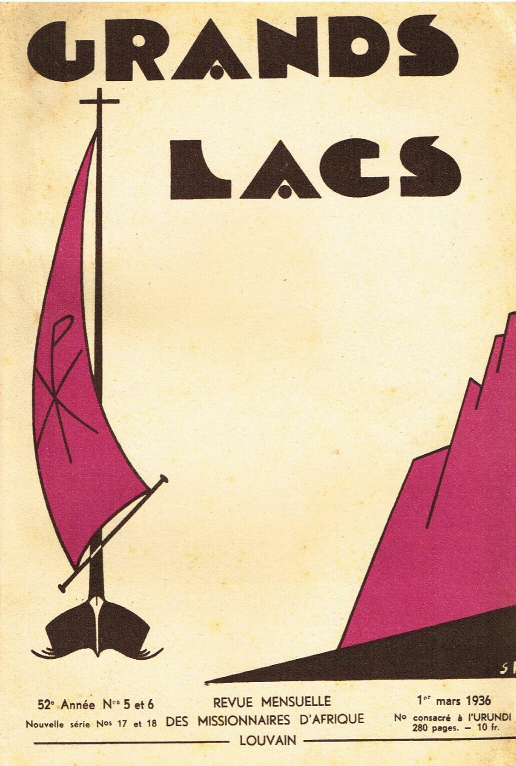 Grands Lacs, revue mensuelle des missionnaires d'Afrique consacrée à l'Urundi, n° de mars 1936, éditée à Louvain et à Paris.